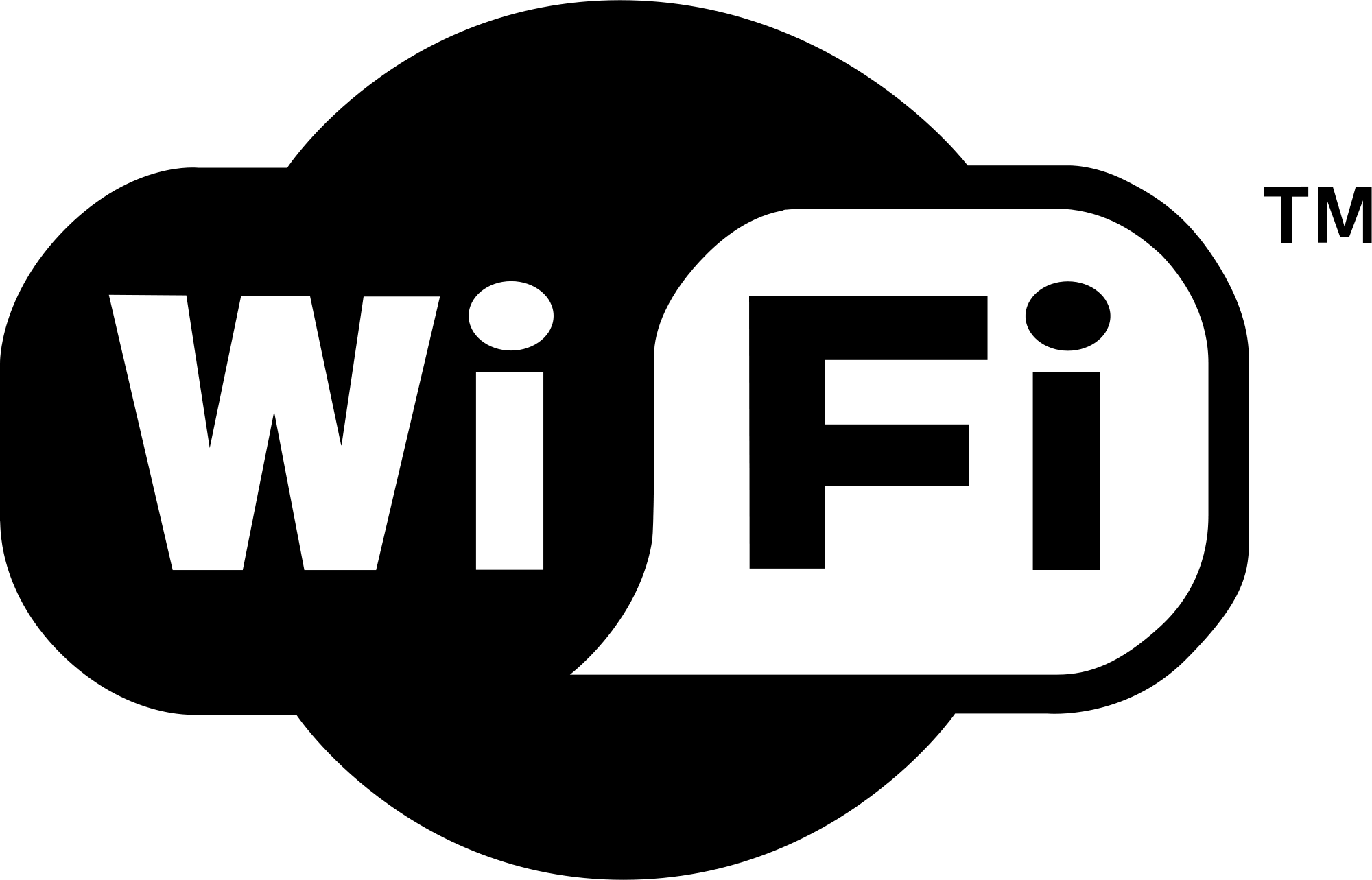 11wifi11